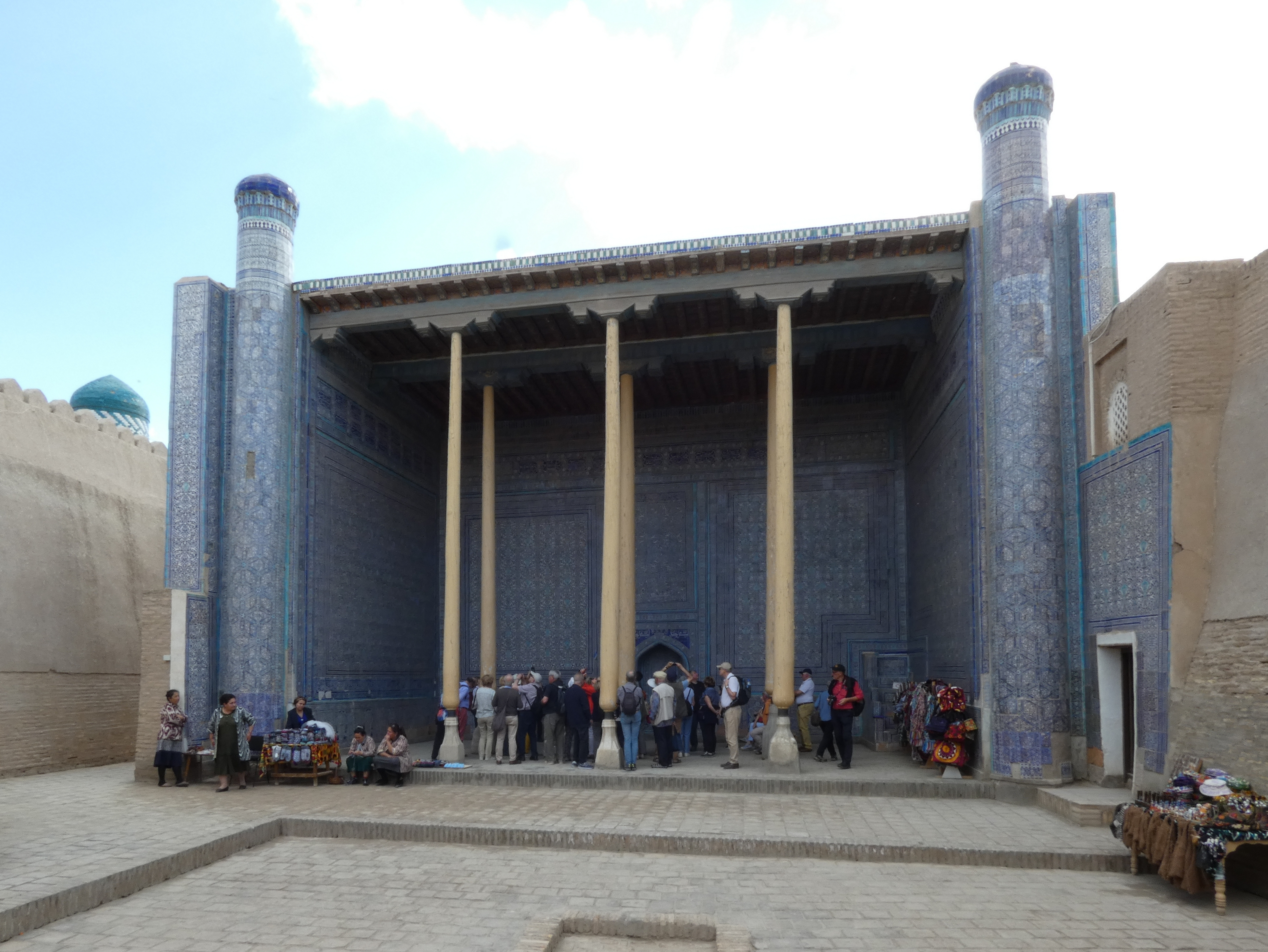 Konya Ark, Chiwa, Moschee, Iwan des offenen Sommerbereichs